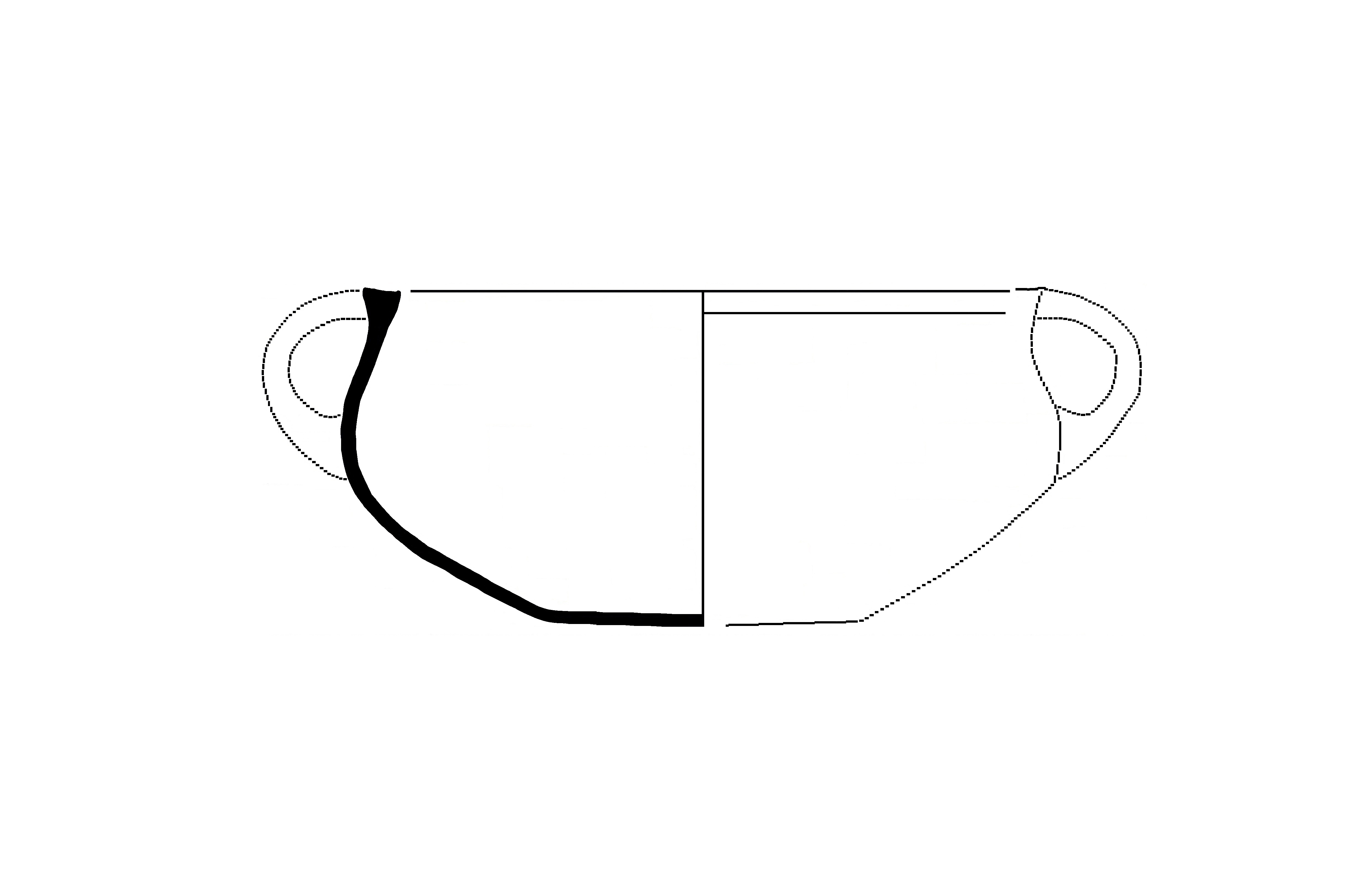 Kakkabe a - marmite trapue à panse arrondie. Forme apparue dans la deuxième moitié du VIe s.